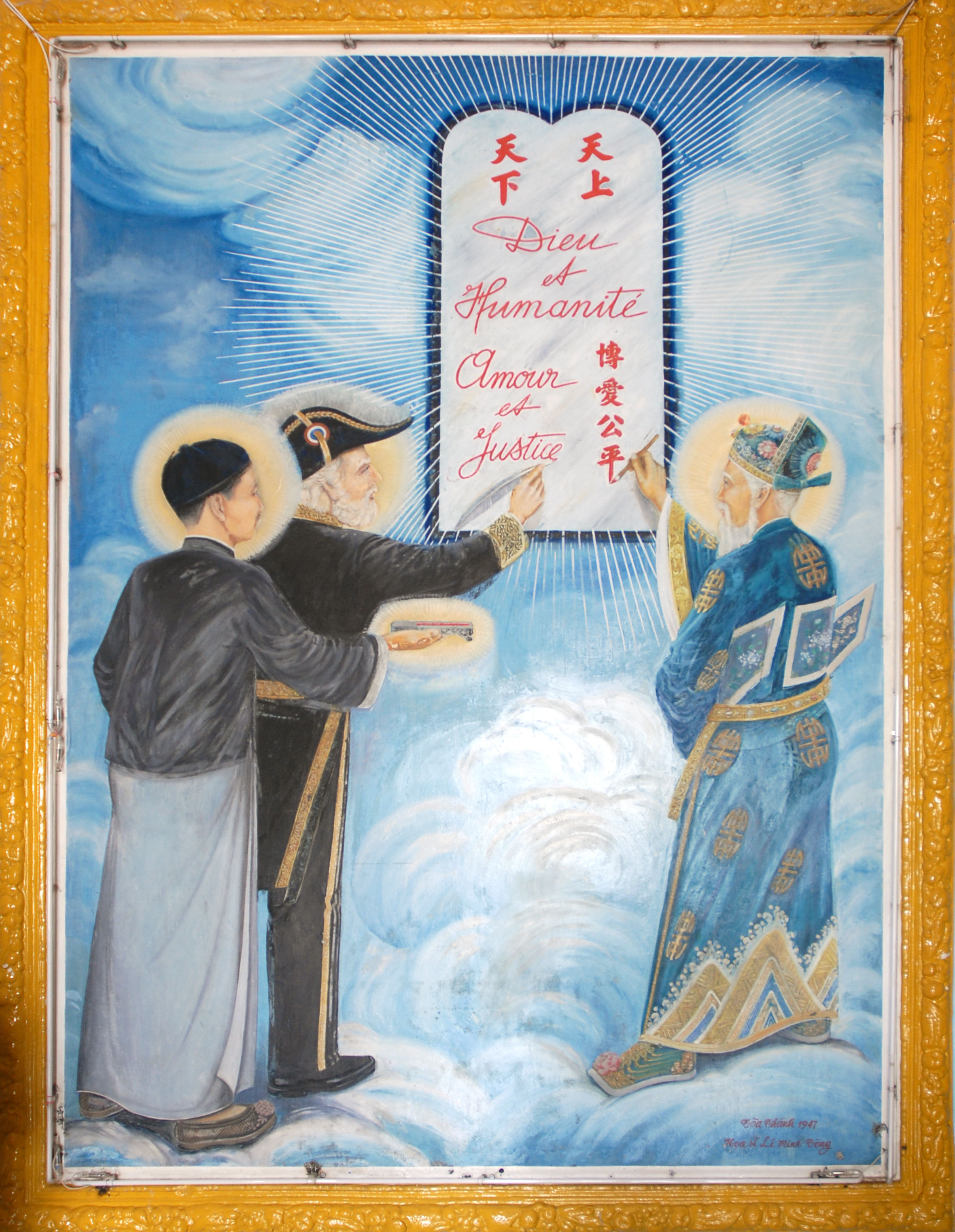 Les trois signataires de la "troisième alliance entre Dieu et l'Homme" Tableau situé dans le hall d'entrée du grand temple de la Sainte Mère à Tay Ninh, au Vietnam De gauche à droite, Sun Yat-Sen (1866-1925), Victor Hugo (1802-1885) et Nguyen Binh Khiem (1492-1587), inscrivant "Amour et Justice" en français et en chinois. ___________________ Le Cao Daï (Palais Suprême) est une religion, fondée en 1926 et reconnue officiellement au Vietnam dont le Saint Siège est à Tay Ninh à une centaine de kilomètres d'Ho Chi Minh Ville (ancienne Saïgon) Le grand temple, appelé Thanh That Cao Dai, a été construit entre 1933 et 1955, sans plan préalable et selon les visions du fondateur de cette religion : Ngô Van Chieu. site officiel